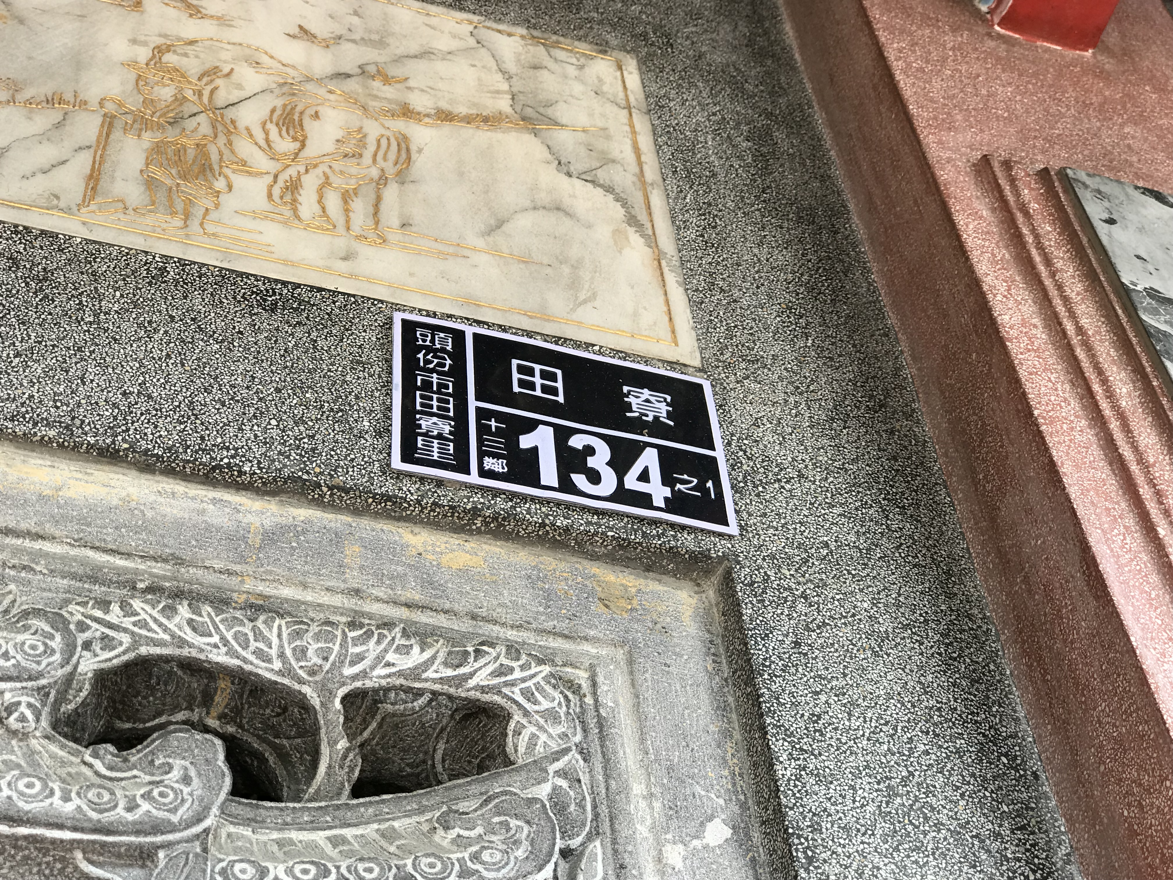 中文（台灣）: 合港田寮永貞宮門牌